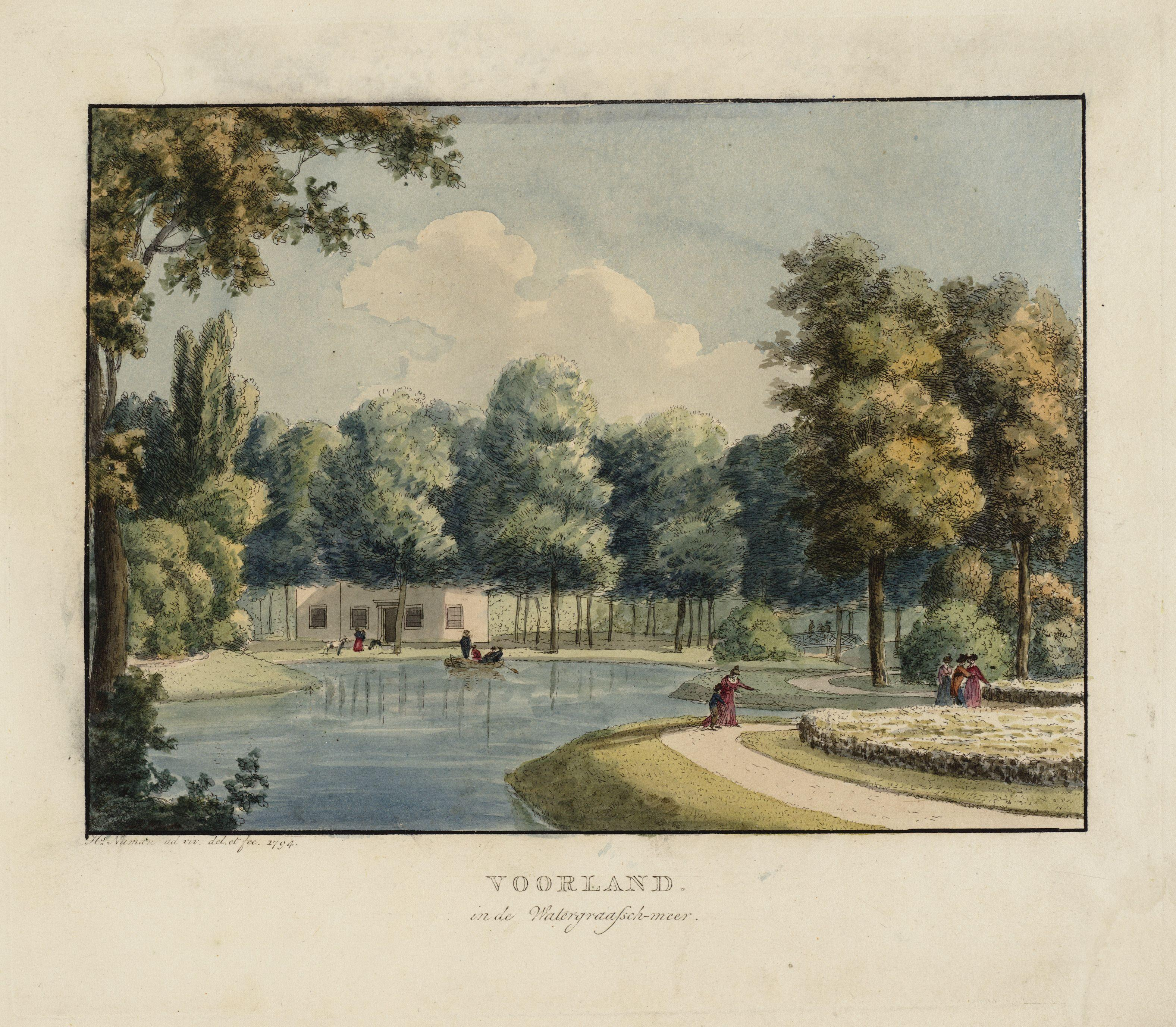 Beschrijving Voorland. in de Watergraafsch-meer Hofstede Voorland, gezicht op het huis over de grote vijver. Techniek: handgekleurde ets. Documenttype prent Vervaardiger Iver, I. Numan, Hermanus (1744-1820) Smit, Johannes (uitgever, eind 18e eeuw) Collectie Collectie Stadsarchief Amsterdam: tekeningen en prenten Datering 1794 Geografische naam Ooster Ringdijk Inventarissen Afbeeldingsbestand 010097013376